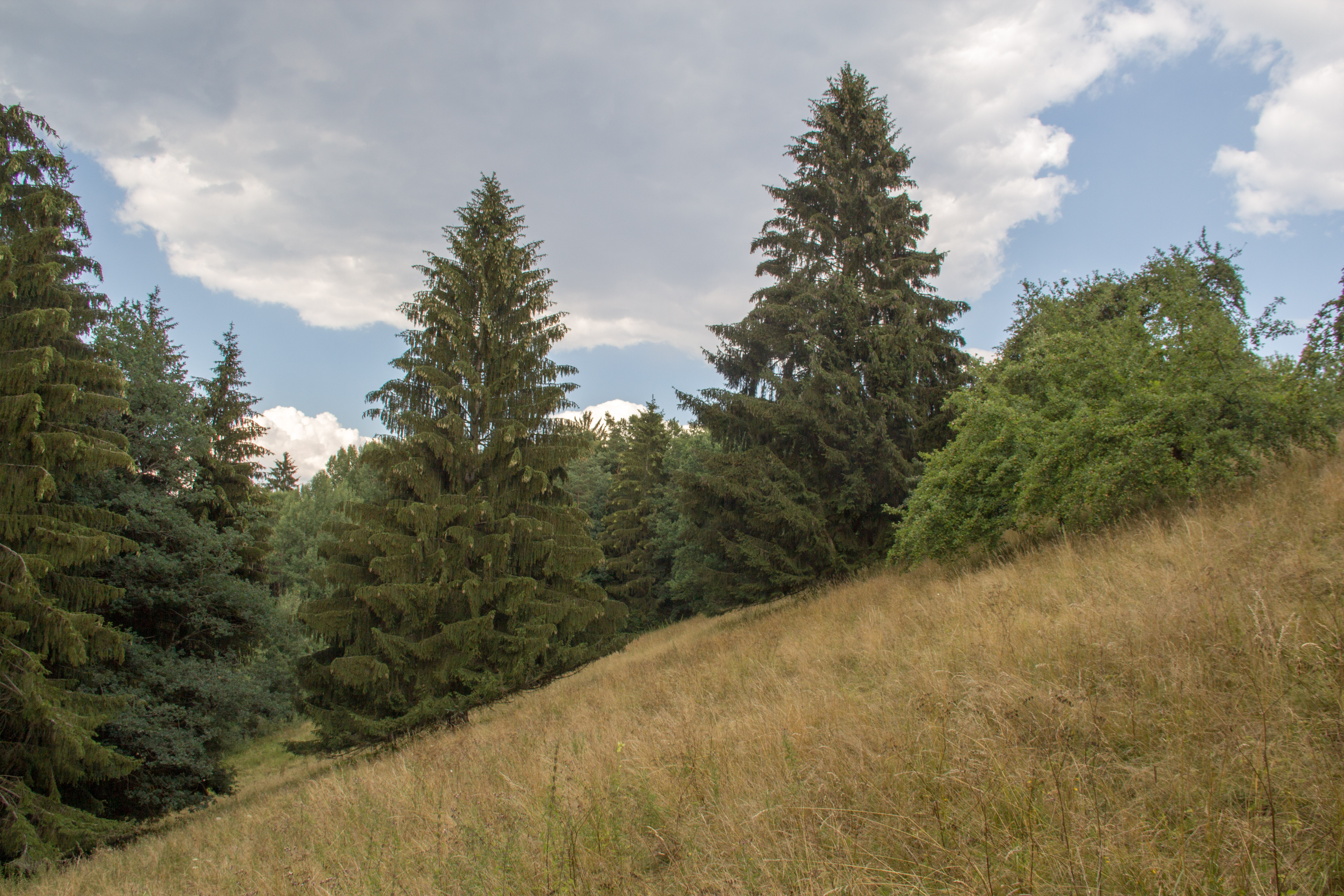 Ludwig-Donau-Main-Kanal, Distlochdamm, Nordhang, Burgthann